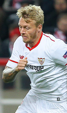 «Спартак» - «Севилья»